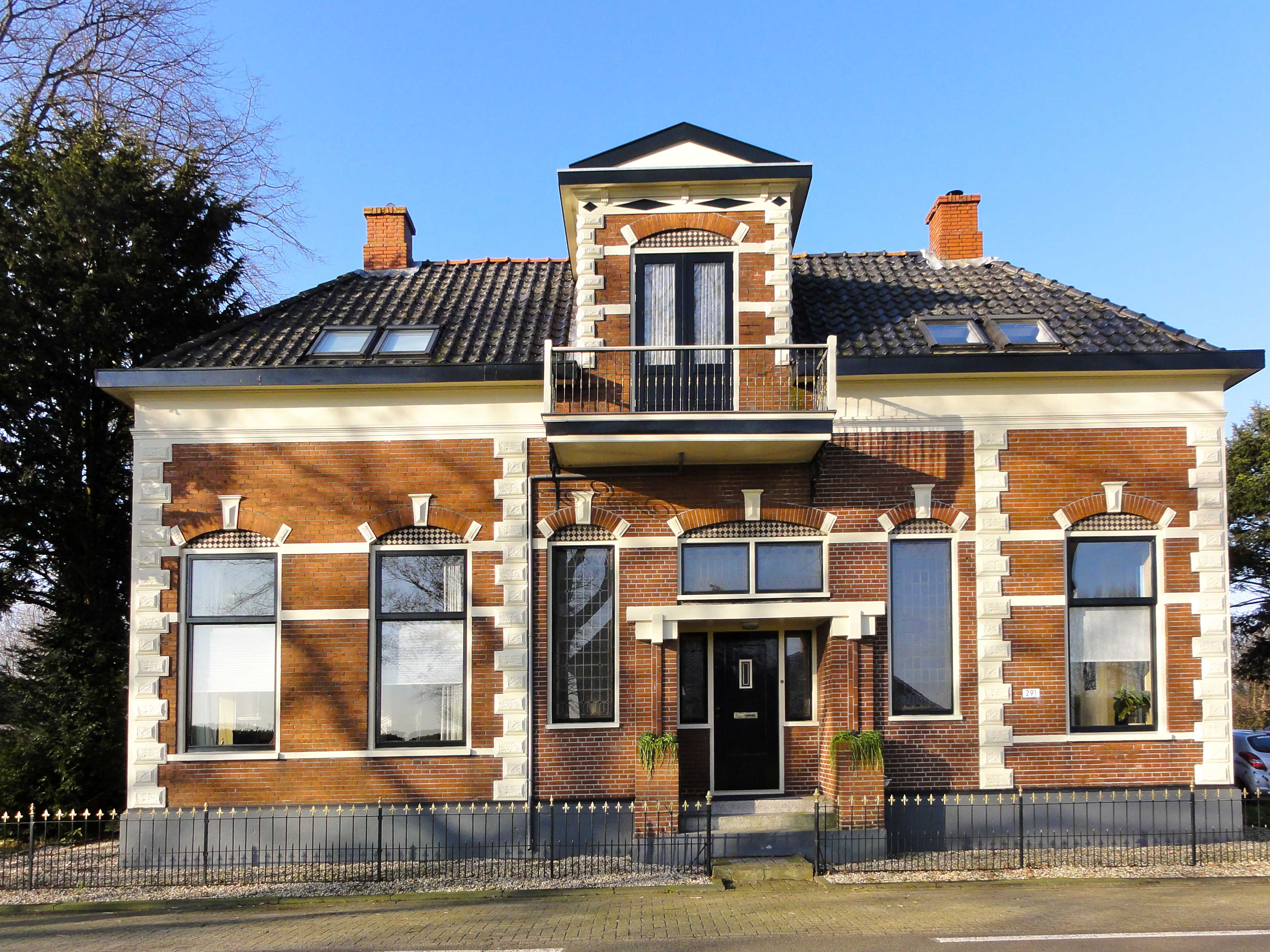 Dwarshuisboerderij Zuiderdiep 291 Tweede Exloërmond, provinciaal monument